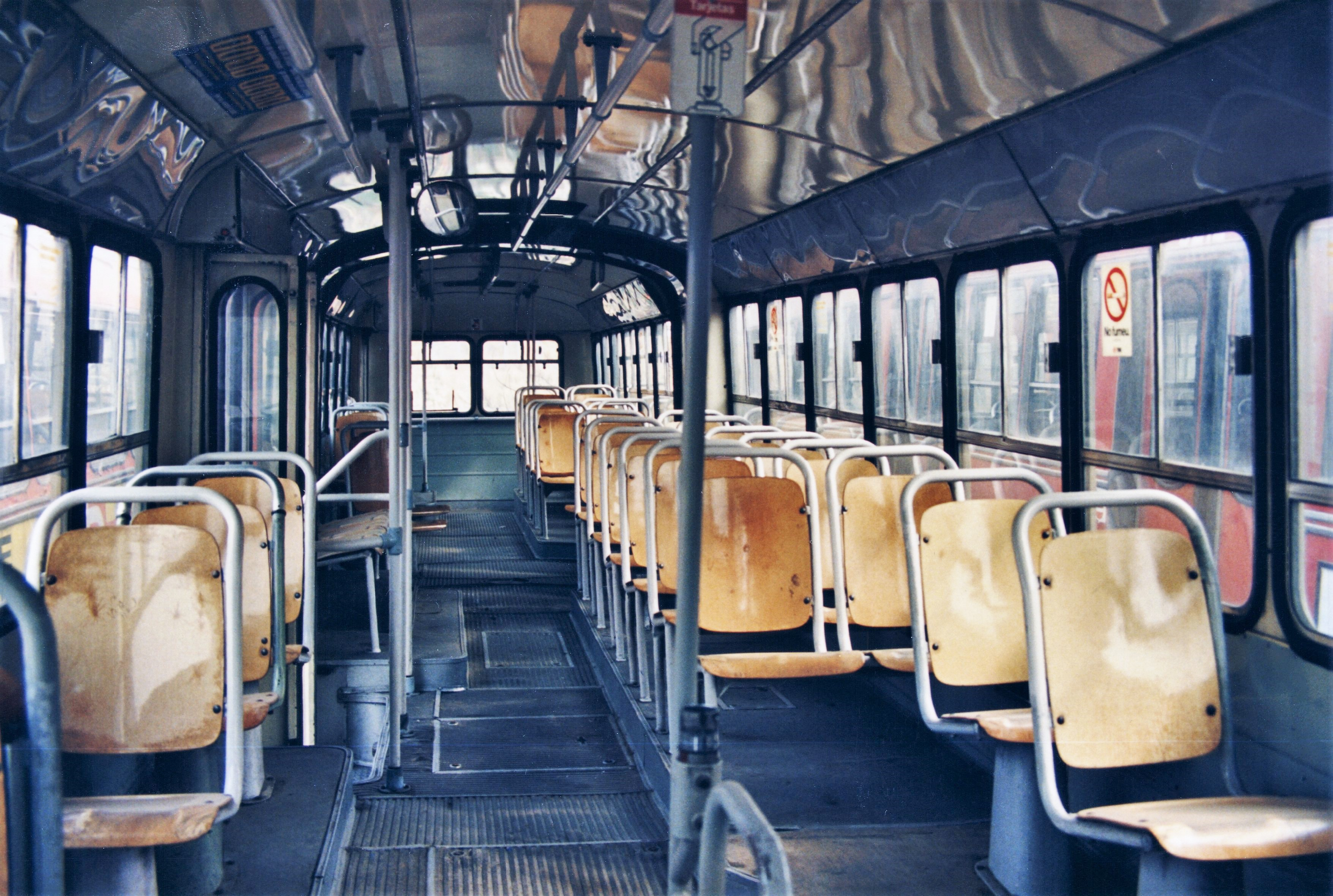 Interior del autobús articulado Pegaso 6035-A número 3005 de Transports de Barcelona, con sus espartanos asientos de chapa de madera.